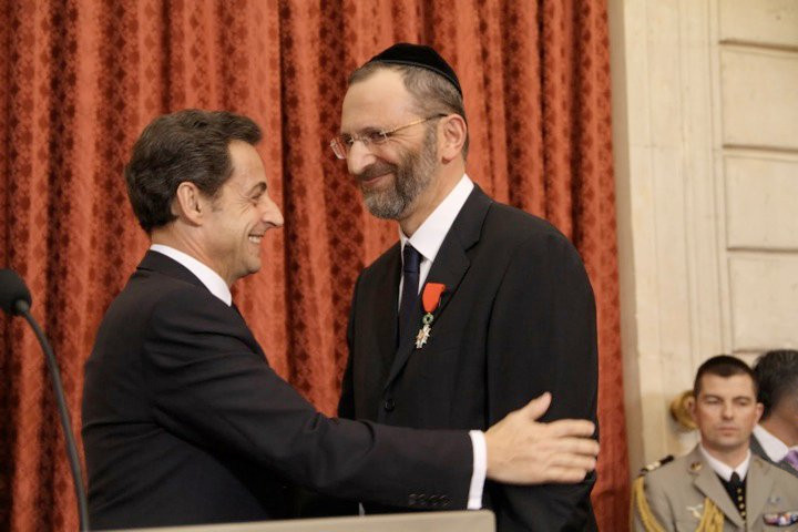 Remise de la Légion d'Honneur au Grand Rabbin de France par le Président de la République Nicolas Sarkozy